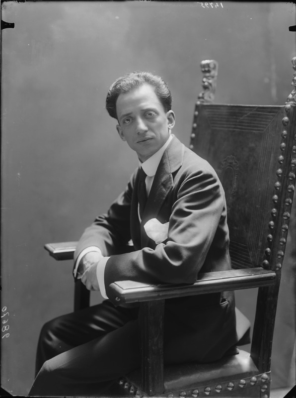 L'attore Alberto Giovannini fotografato da Mario Nunes Vais